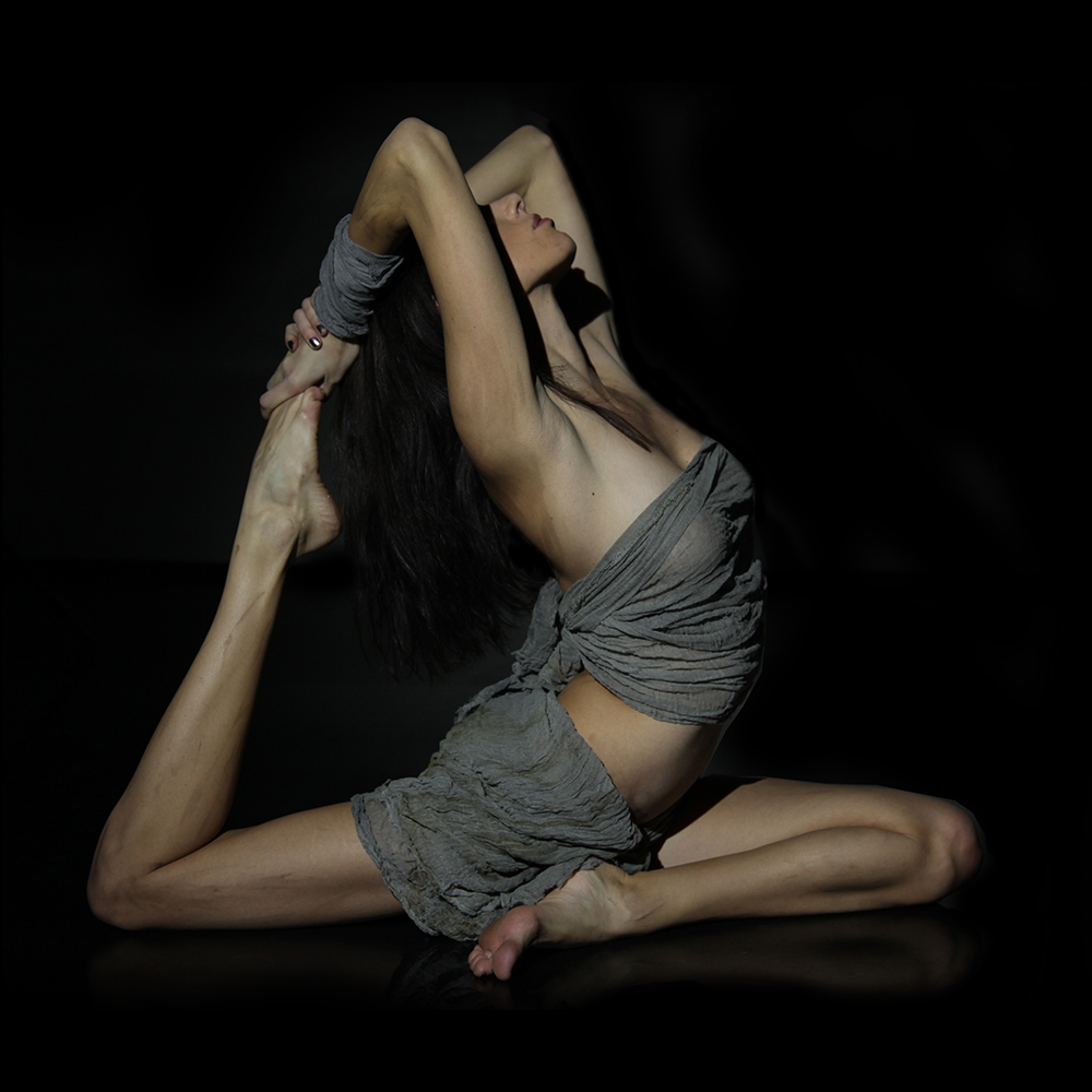 Eka Pada Raja Kapotasana by Nina Mel, Yoga Teacher